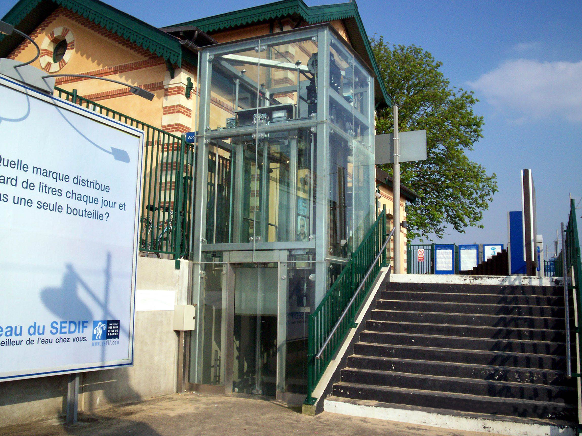 Photo de l'ascenseur de la gare de Noisy-le-Roi